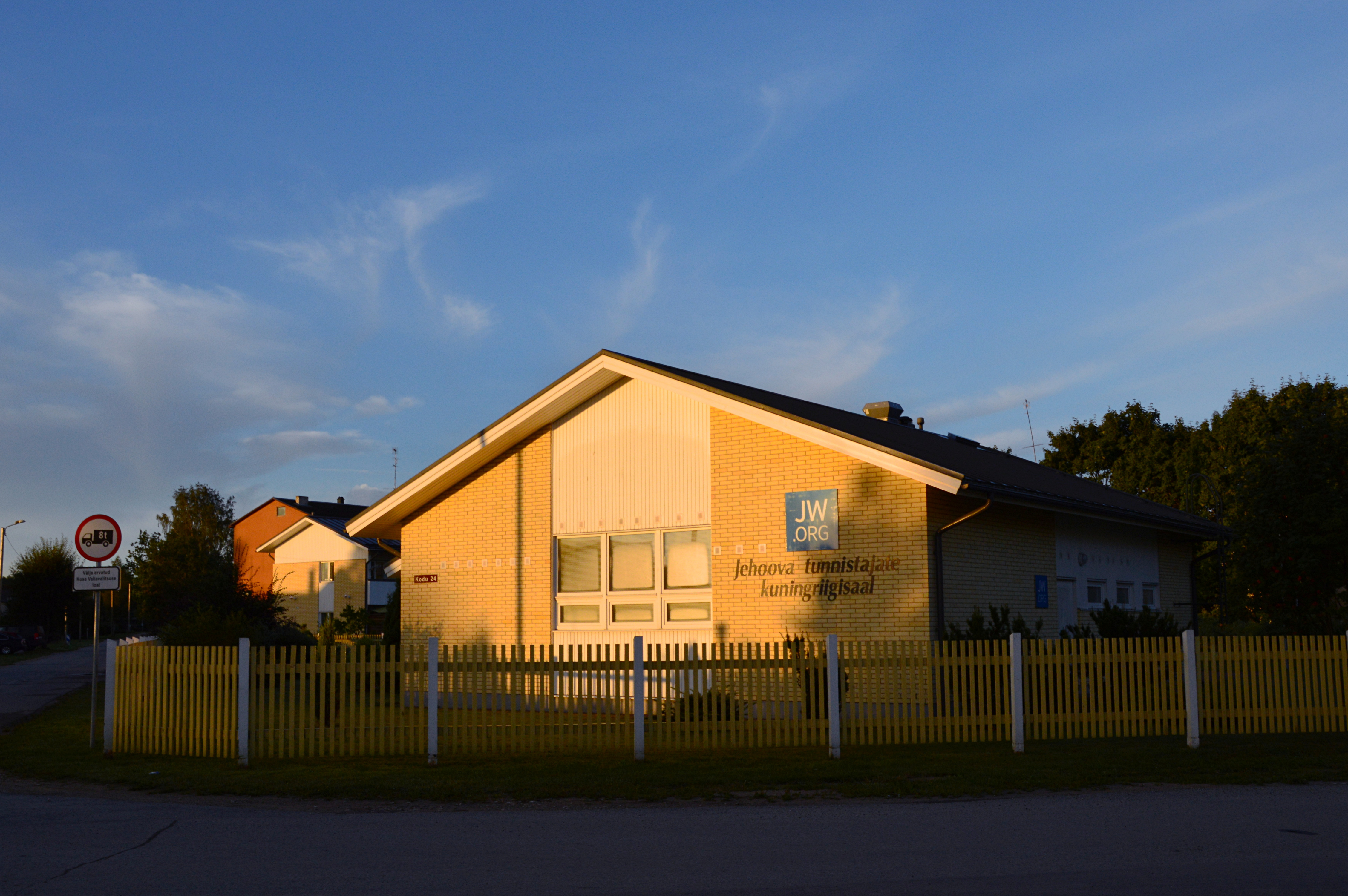 Jehoova tunnistajate kuningriigisaal Kosel.